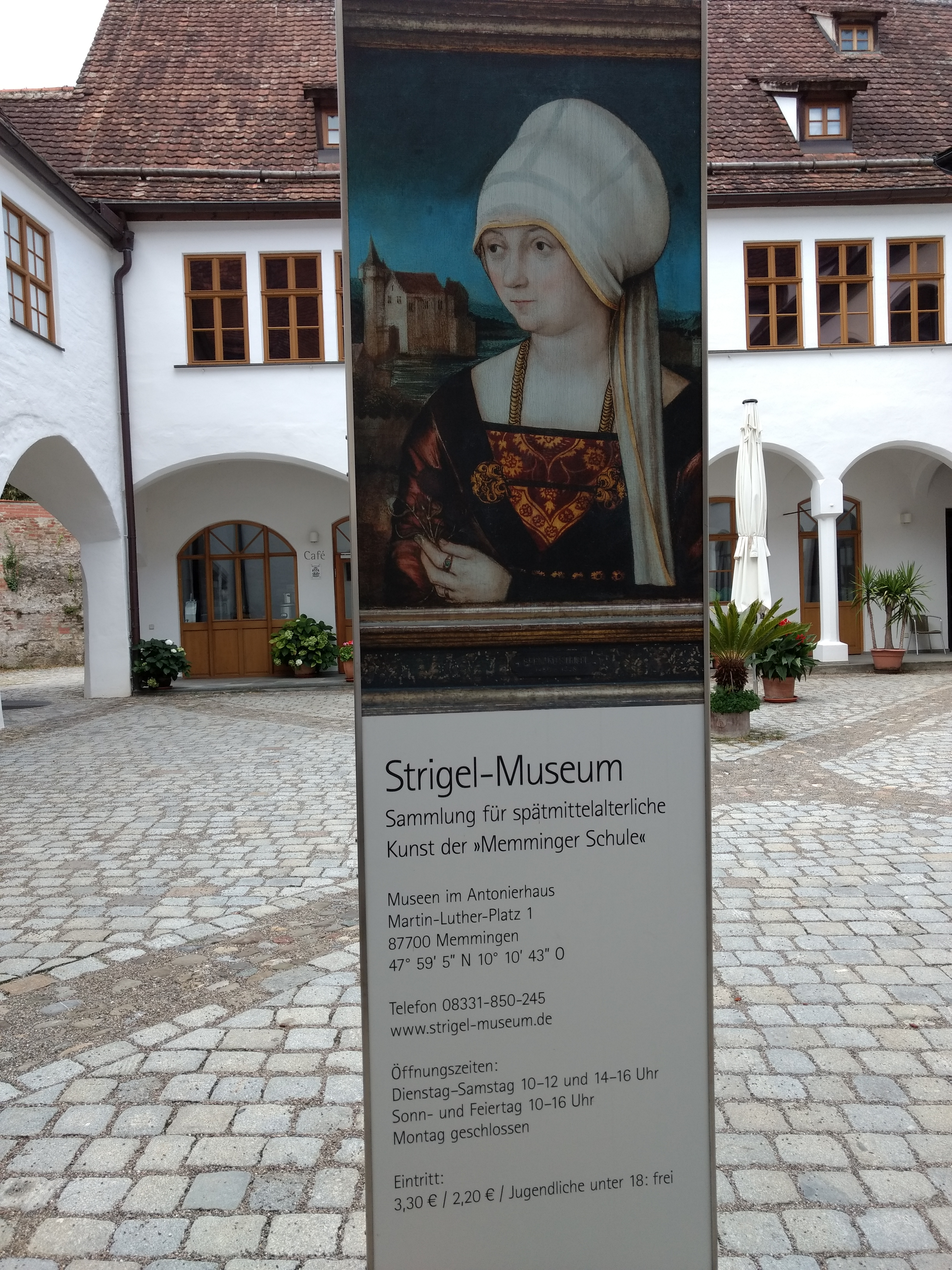 Antoniterkloster Memmingen